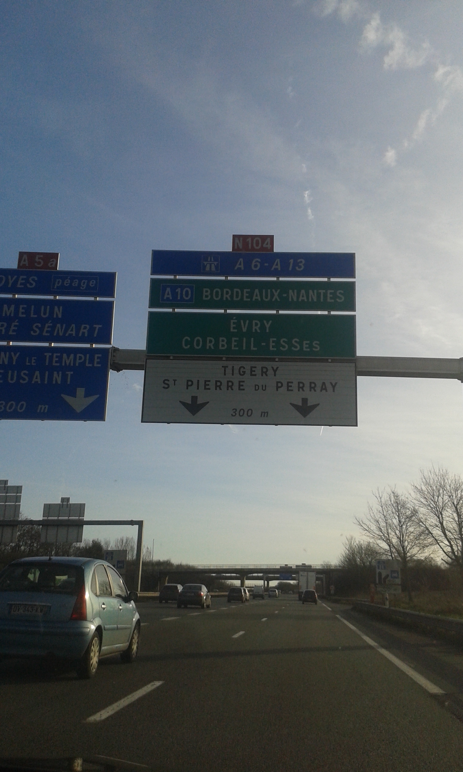 Panneau placé sur la route nationale 104 (en provenance de l'Est) à l'intersection avec l'autoroute A5a à son commencement (en direction du Sud)